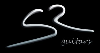 Logo SR Guitars